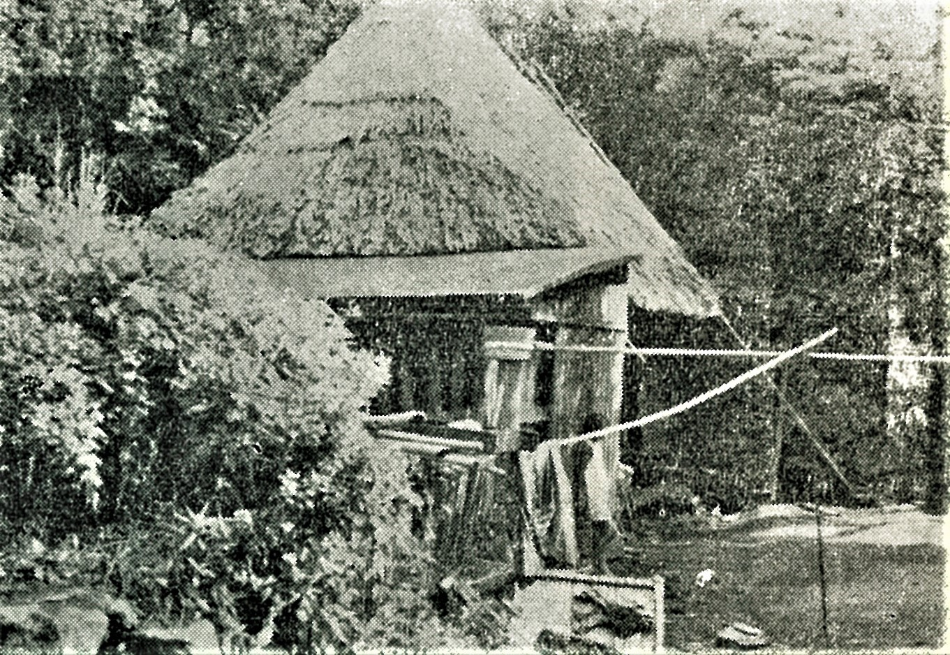 八丈小島鳥打地区の家（昭和25年頃）